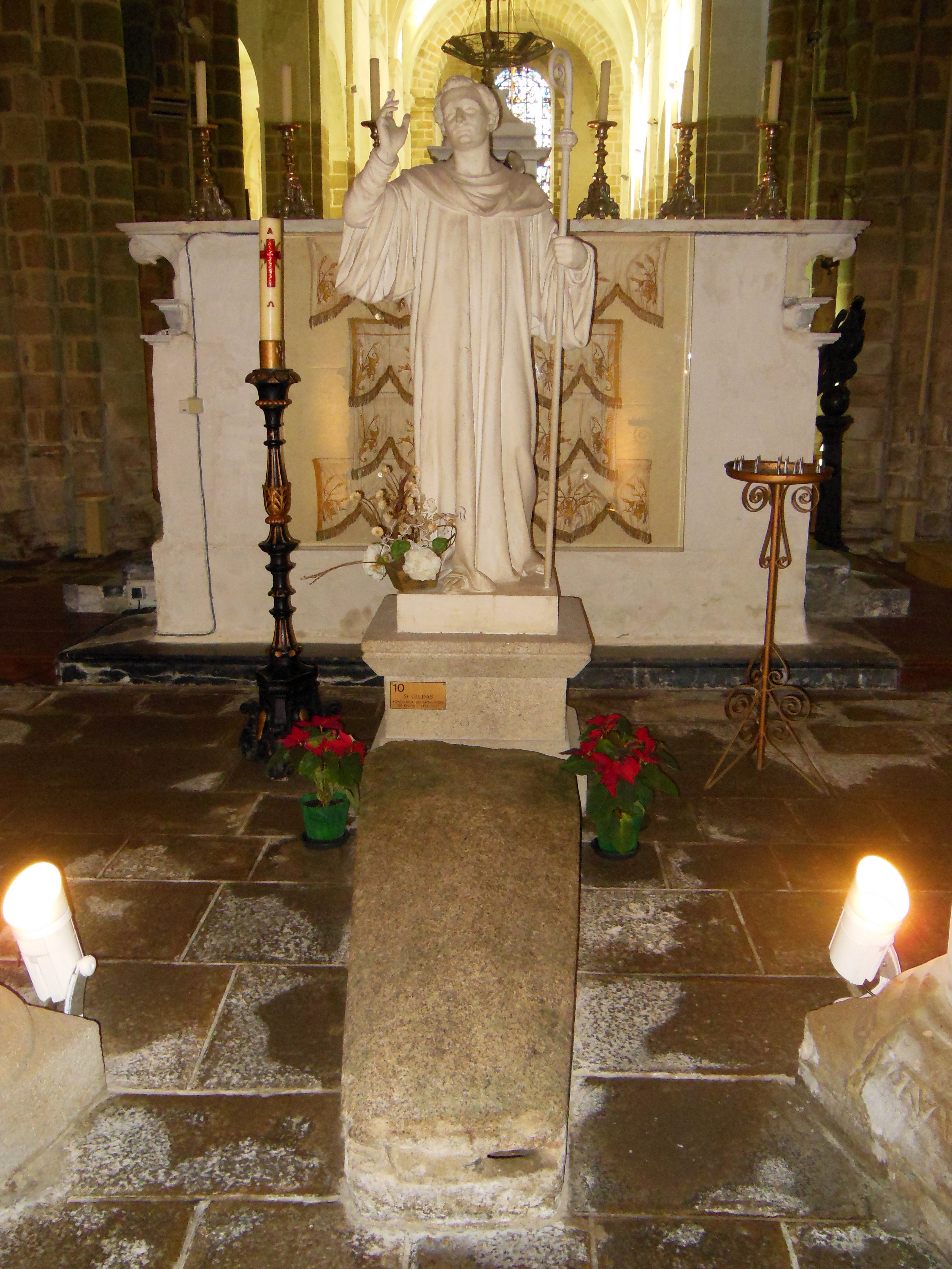 Statue et sarcophage de saint Gildas, dans l'abbaye de saint-Gildas de Ruys (Morbihan, France)